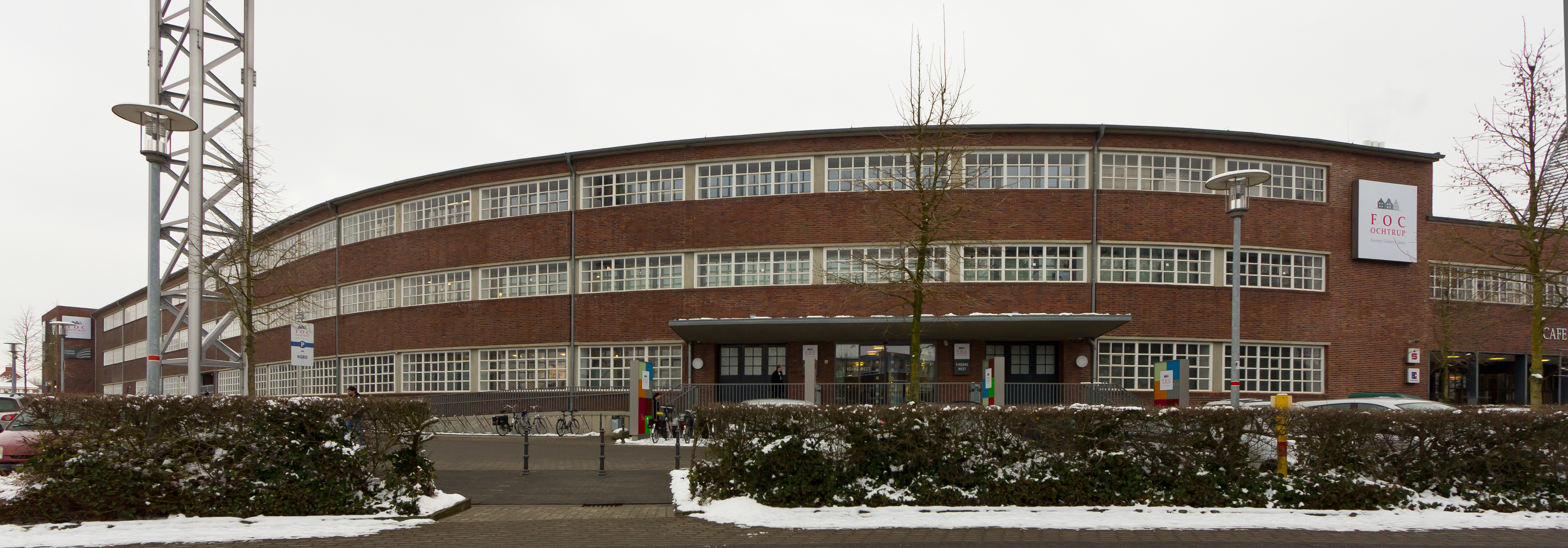 Ehemaliges Empfangs- und Lagerbauwerk der Textilfabrik Gebrüder Laurenz, Architekt: Dominikus Böhm. Heute genutzt als Factory Outlet Center Ochtrup (FOC)